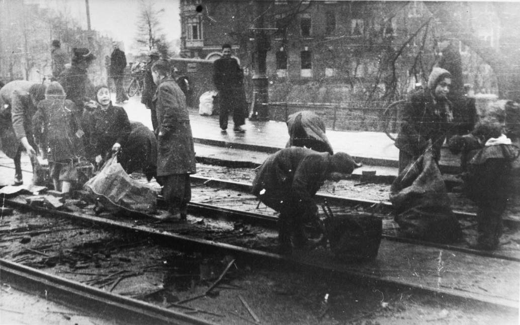 Hongerwinter 1944/1945. Mensen rapen houtblokjes tussen tramrails